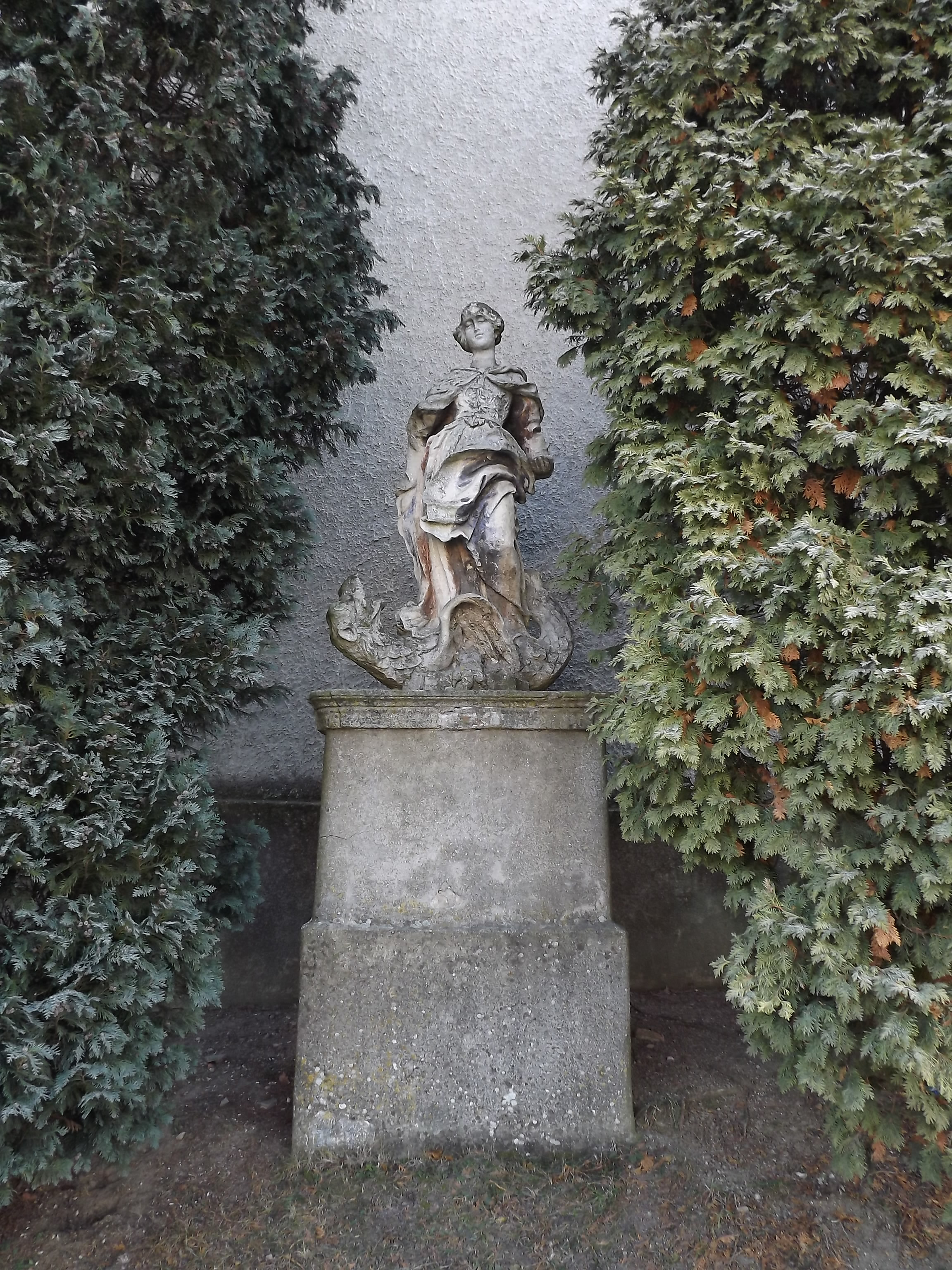 Kostel Nanebevzetí P. Marie (Staré Hobzí), Staré Hobzí